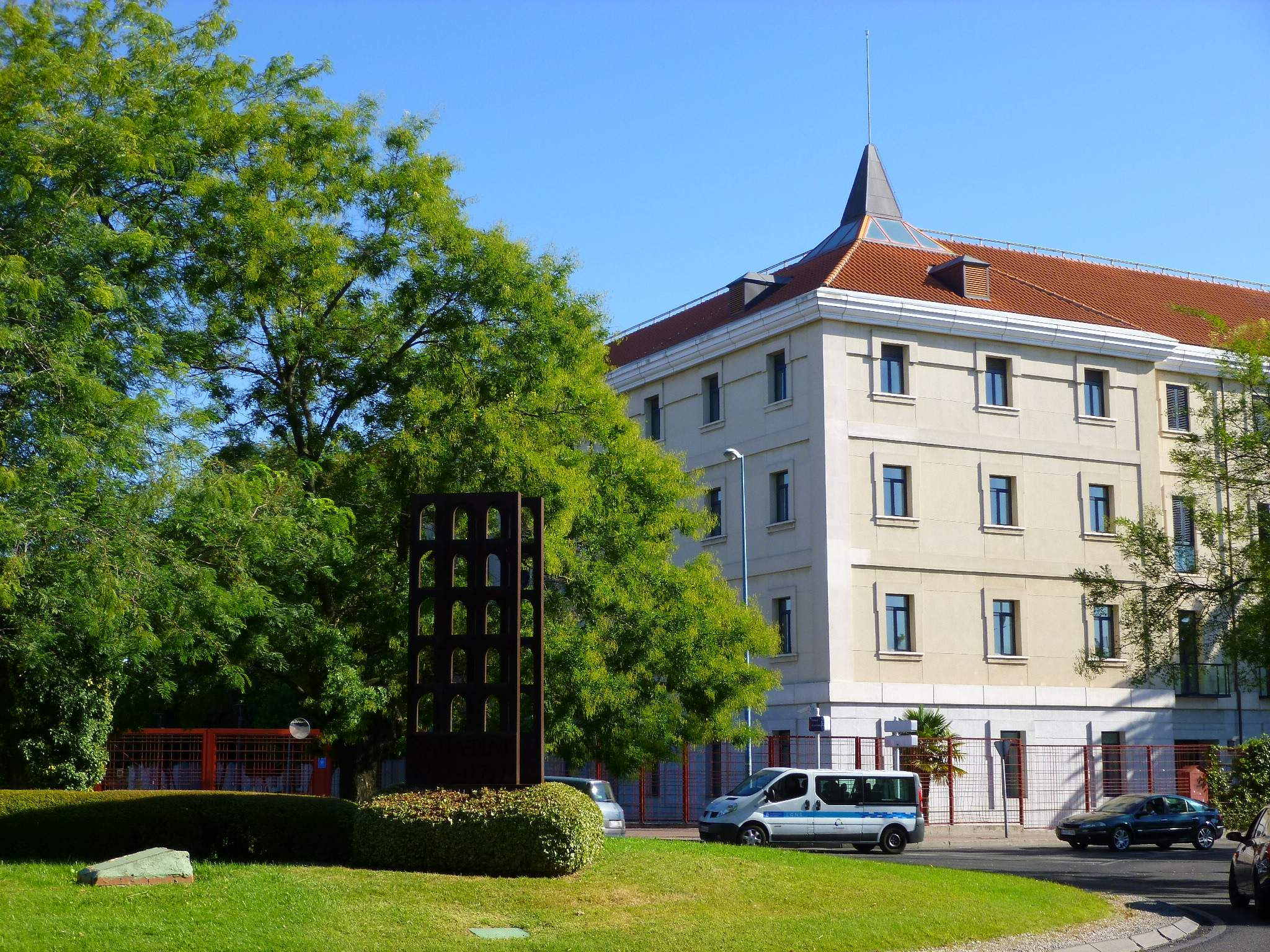 Universidad Carlos III, Leganés